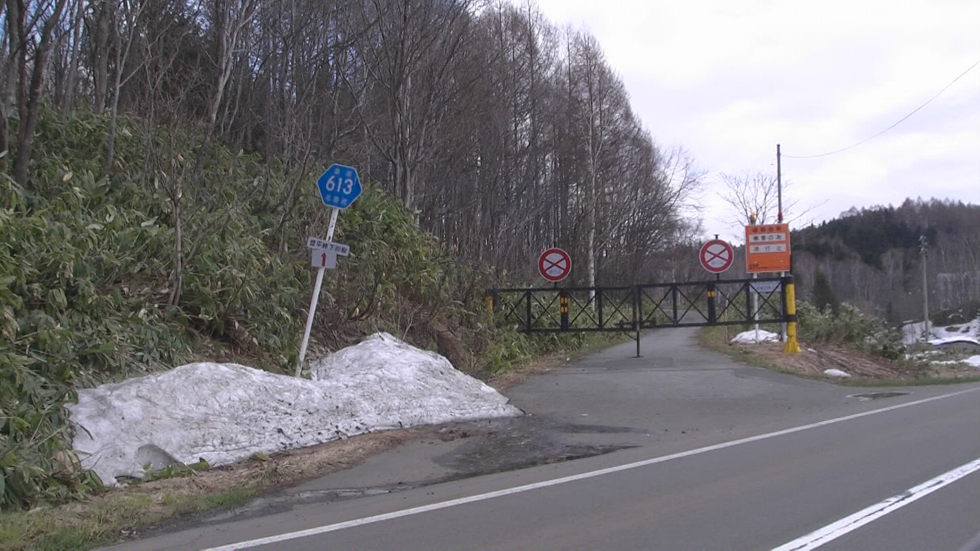 道道613号 遮断機